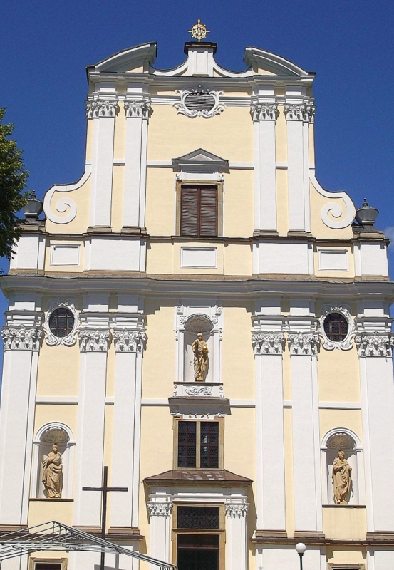 Krzeszów, kościół pw. św. Józefa, fasada